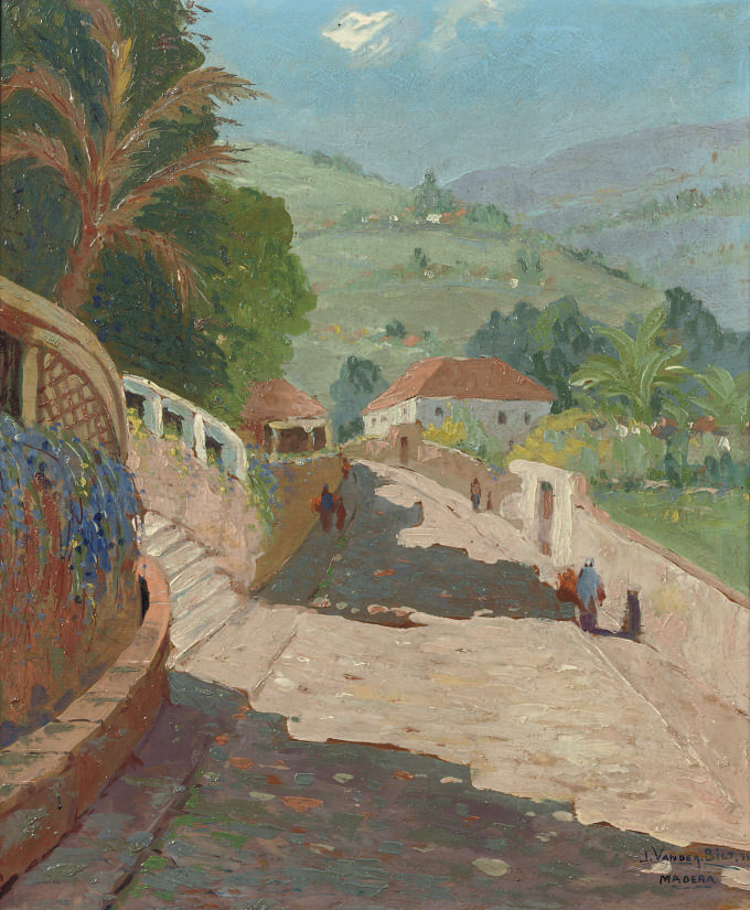 Funchal Madeira - Route de St. Crux